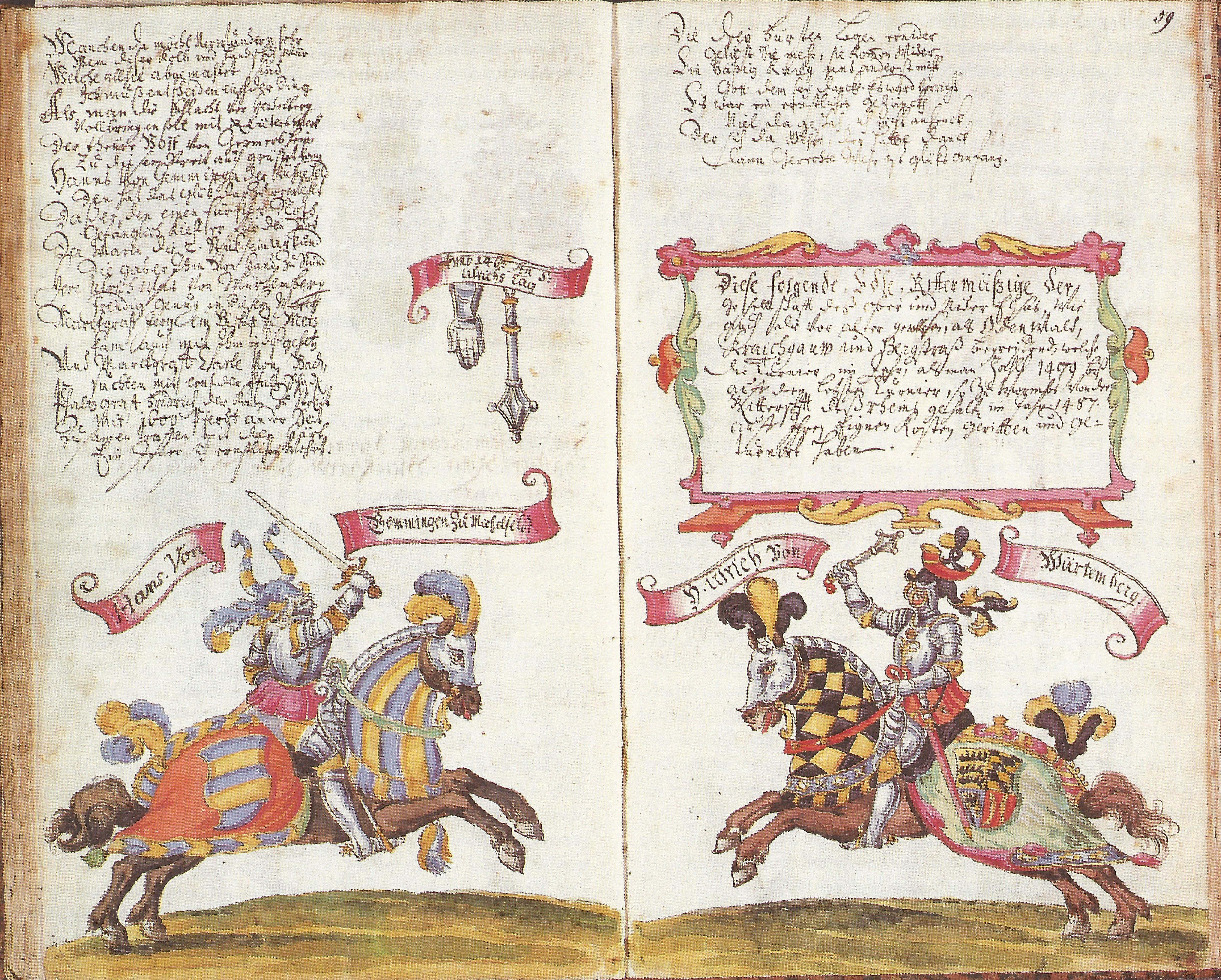 Hans von Gemmingen erhält in der Schlacht von Seckenheim Eisenhandschuh und Faustkolben von Graf Ulrich von Württemberg. Turnierbuch der Freiherren von Gemmingen WLB Stuttgart Cod. hist. 2° 298, Bl. 58v-59r